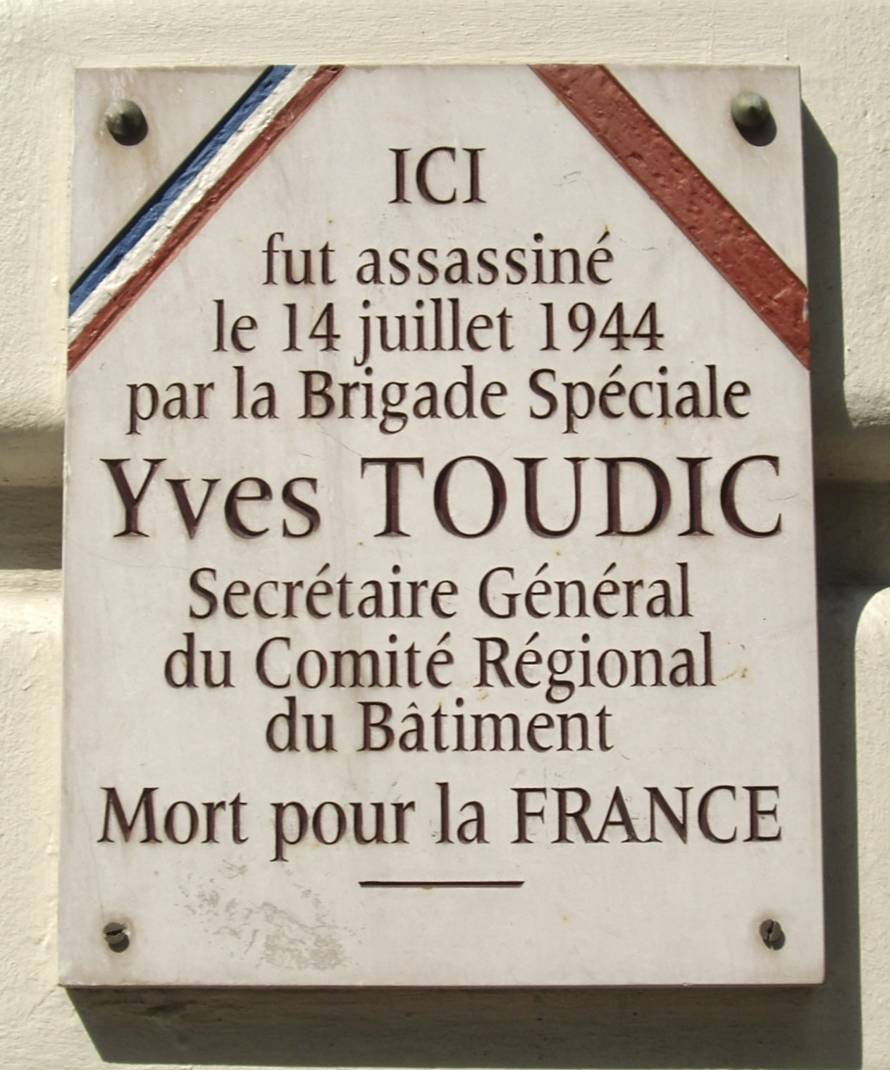 Plaque apposée à l'angle de la rue Meslay et de la rue du Temple, Paris 3e. « Ici fut assassiné le 14 juillet 1944, par la Brigade spéciale, Yves Toudic, secrétaire général du Comité régional du bâtiment, mort pour la France. »